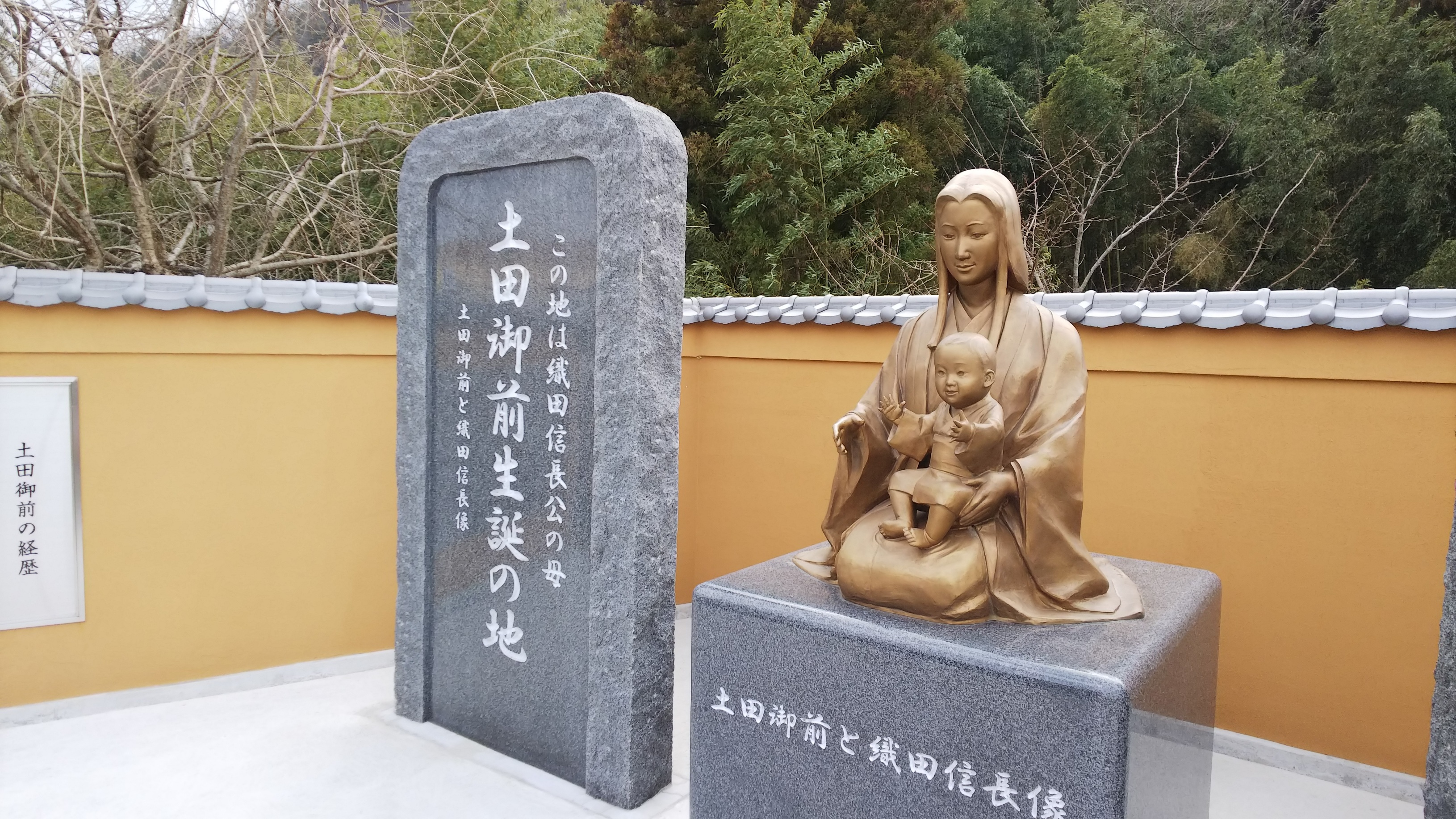 岐阜県可児市、土田城址近くの土田御前の像